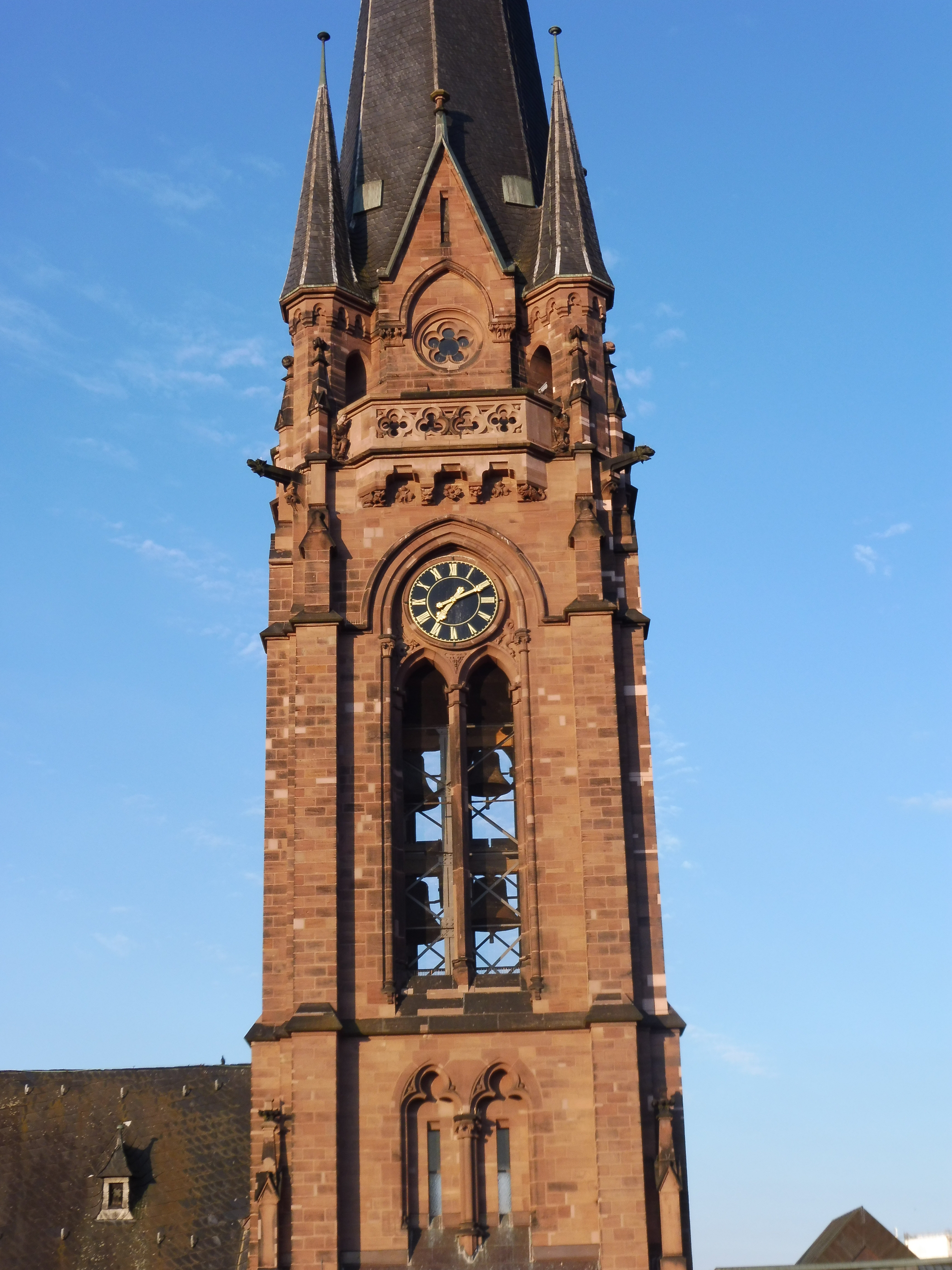 Kirchturm, Geläut, Uhr und Filialtürme der Johanneskirche in Saarbrücken